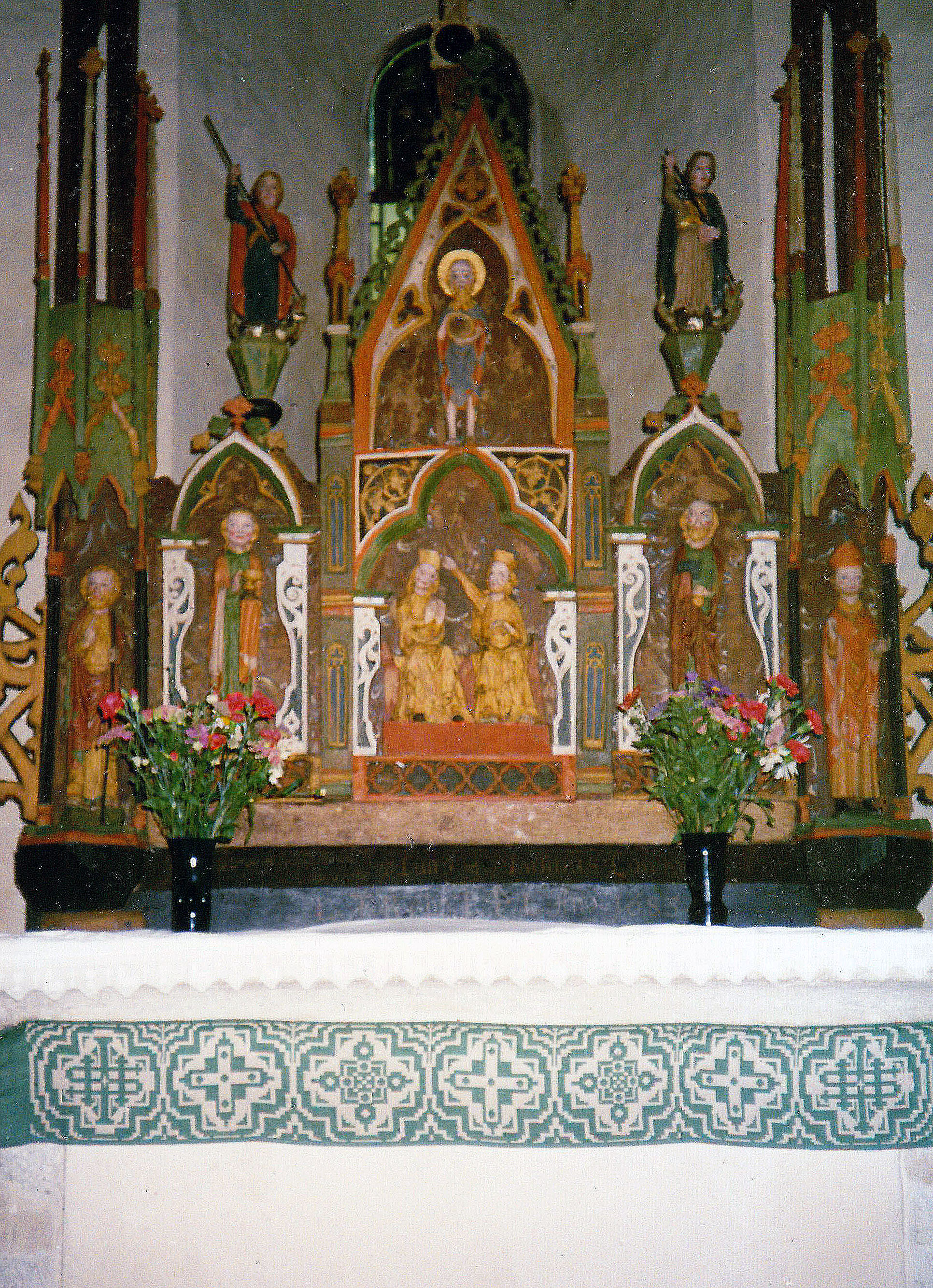 Träkumla kyrka.Retabel från 1300-talet.Marias kröning.